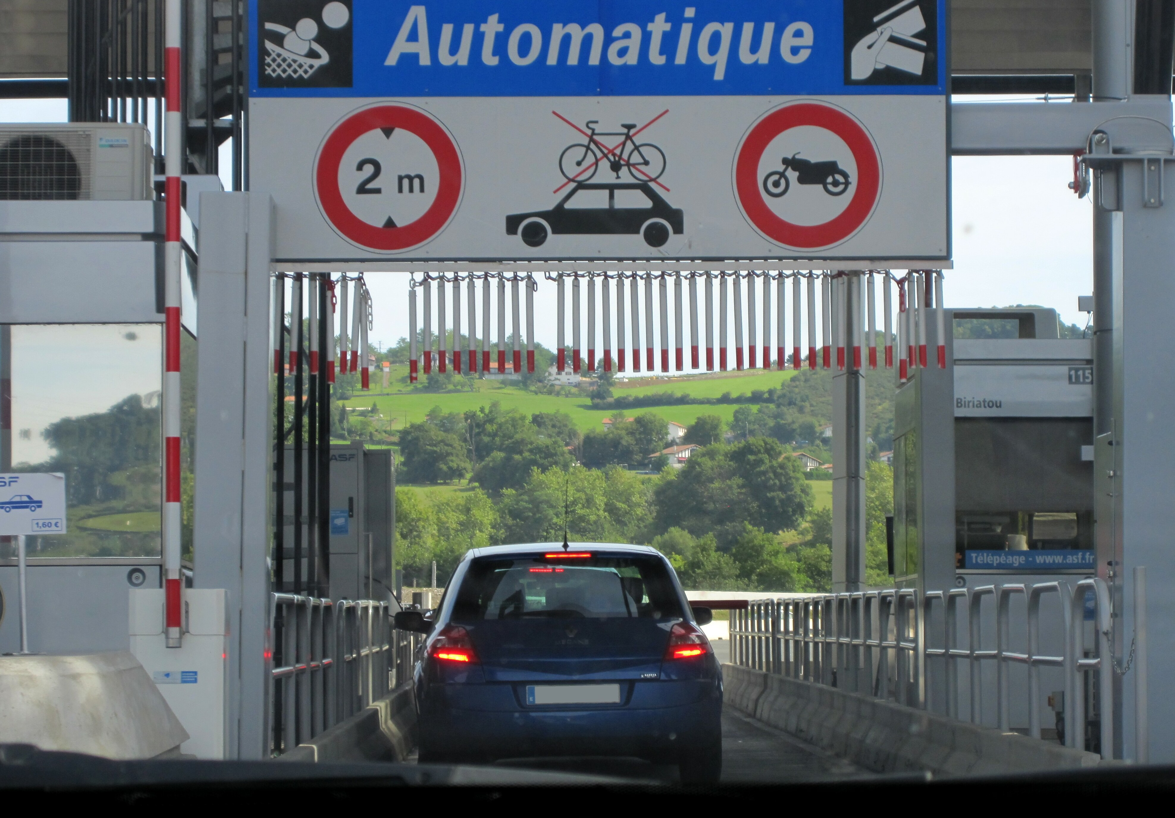 Peaje / Toll / Péage